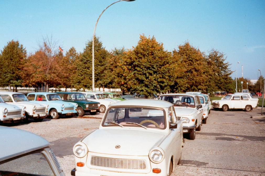 A parking lot in East-Berlin 1983. Mainly Trabants, a white Wartburg and a dark green Lada. (verw) (huidig) 29 aug 2004 16:44 . . Quistnix (Overleg) . . 1011x672 (316158 bytes) (Parkeerplaats in Oost-Berlijn in 1983 met Trabants - eigen werk)